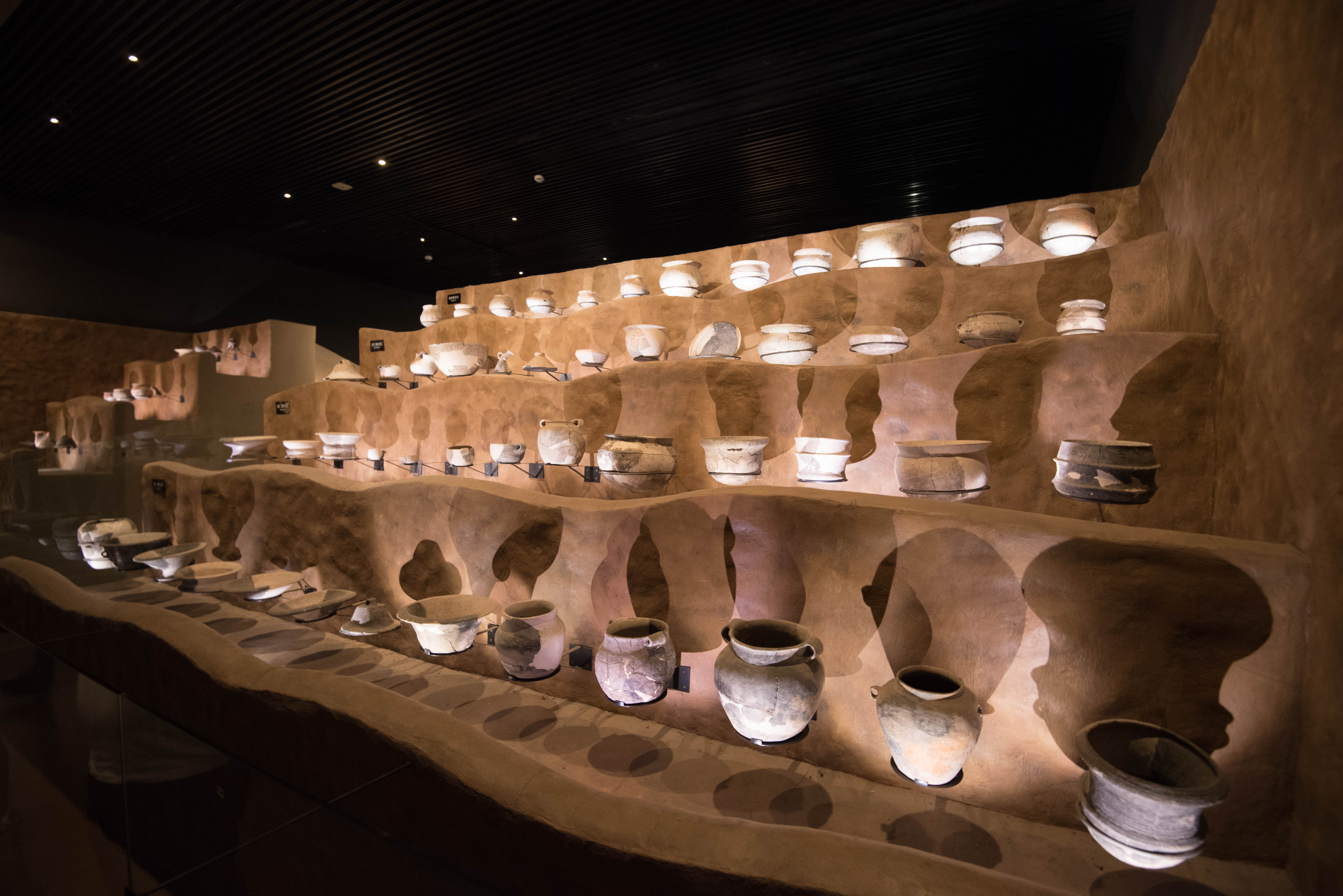 河姆渡各期陶器，最下为第一期，最上为第四期